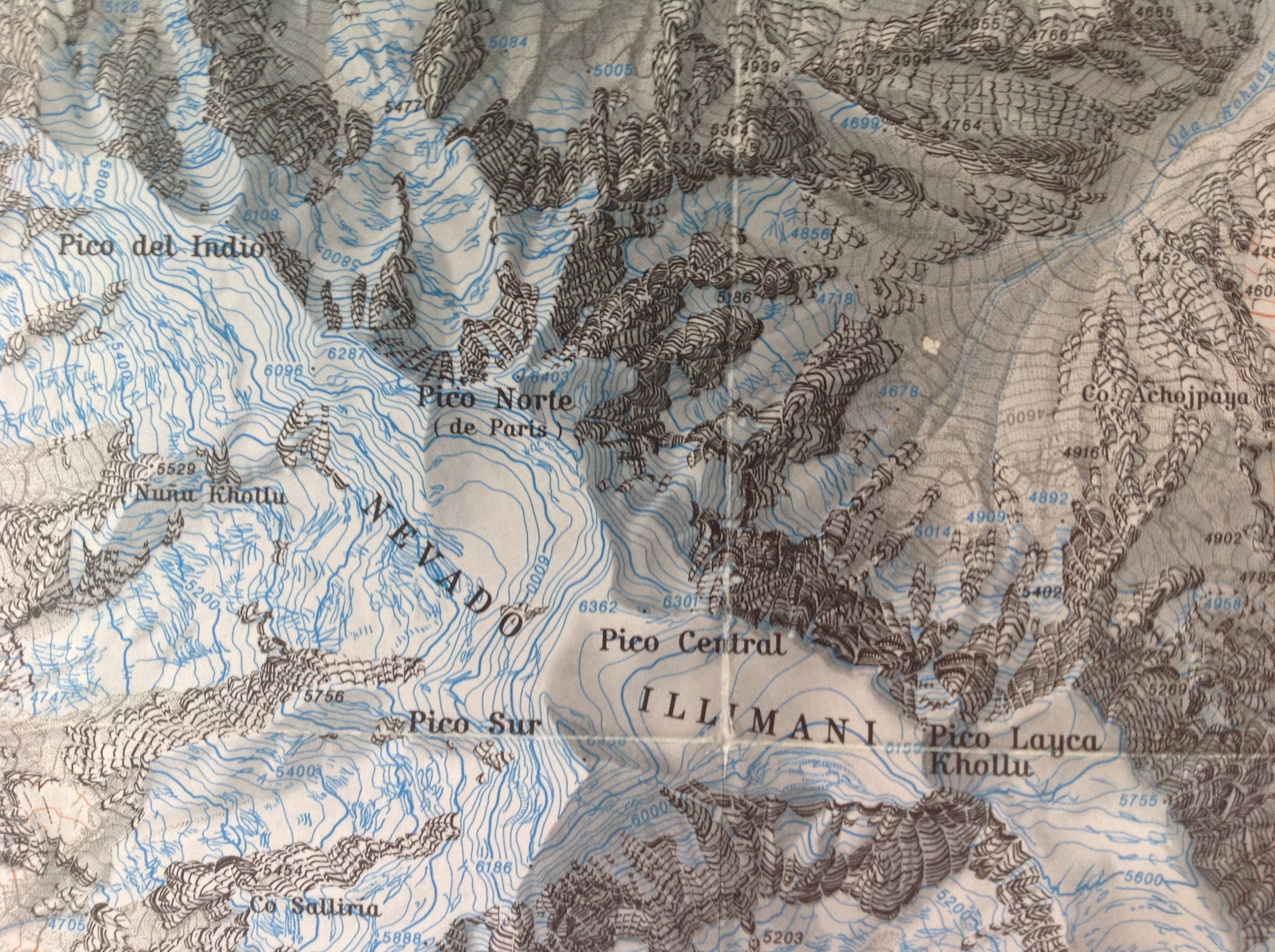 Ausschnitt aus der DAV-Karte Cordillera Real Süd Illimani